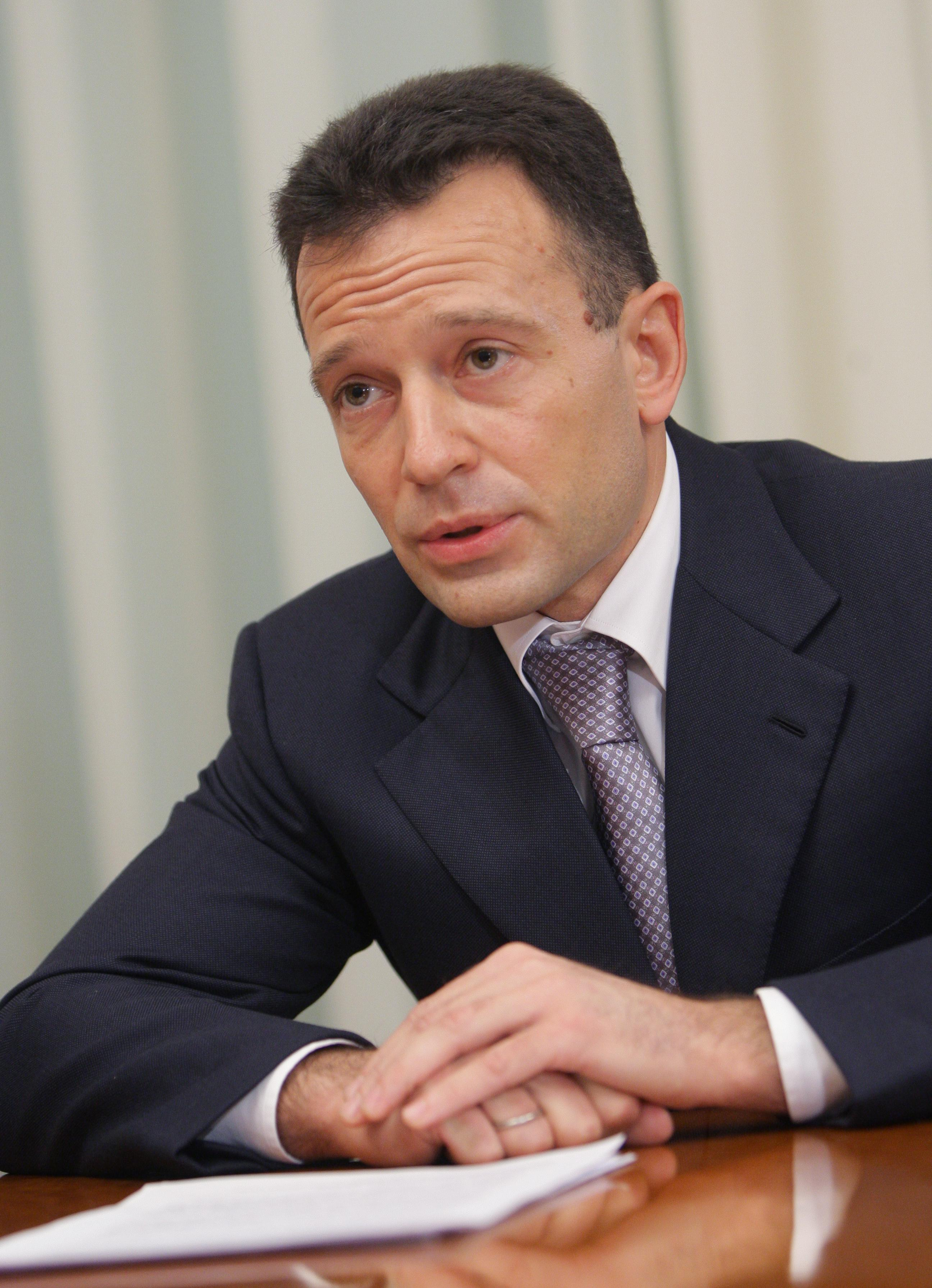 Руководитель Федерального агентства по делам молодёжи В. Г. Якеменко на встрече с Председателем Правительства Российской Федерации В. В. Путиным